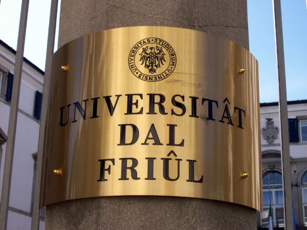 Università degli studi di Udine (Friuli-Venezia Giuia-Italy), targa in friulano all'ingresso di Palazzo Florio sede del Rettorato.